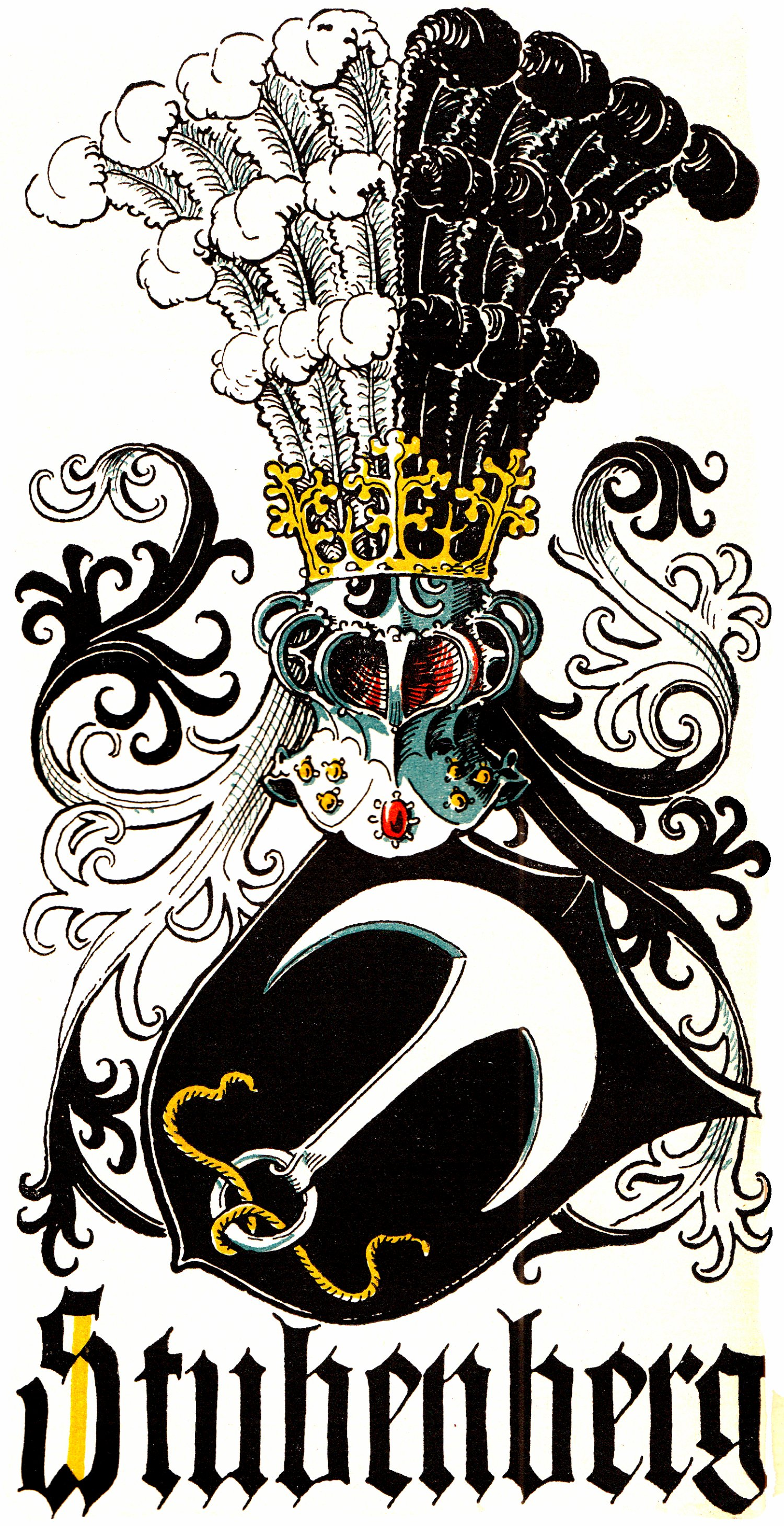 Wappen derer von Stubenberg